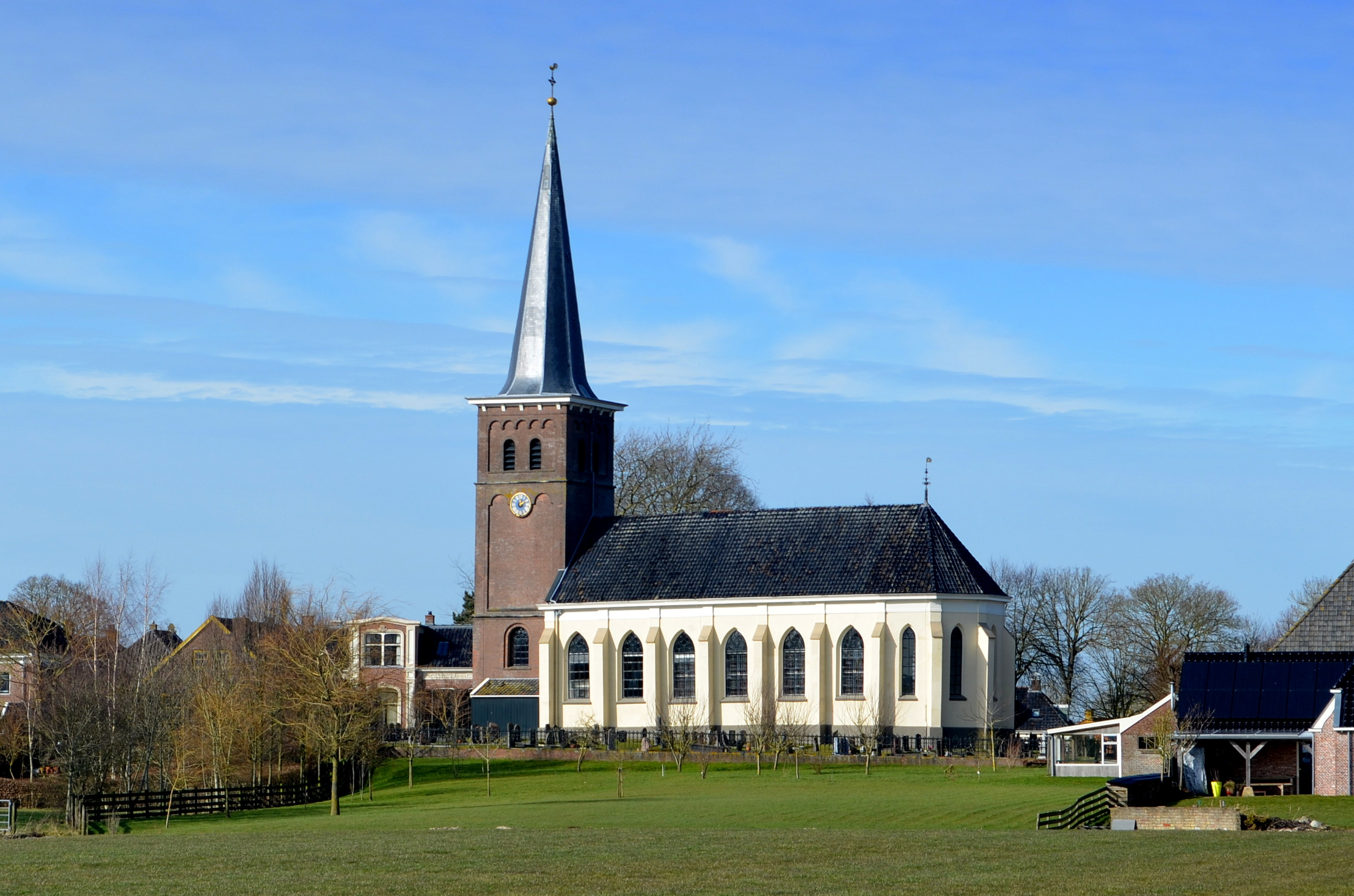 Mantgum, Mariakerk